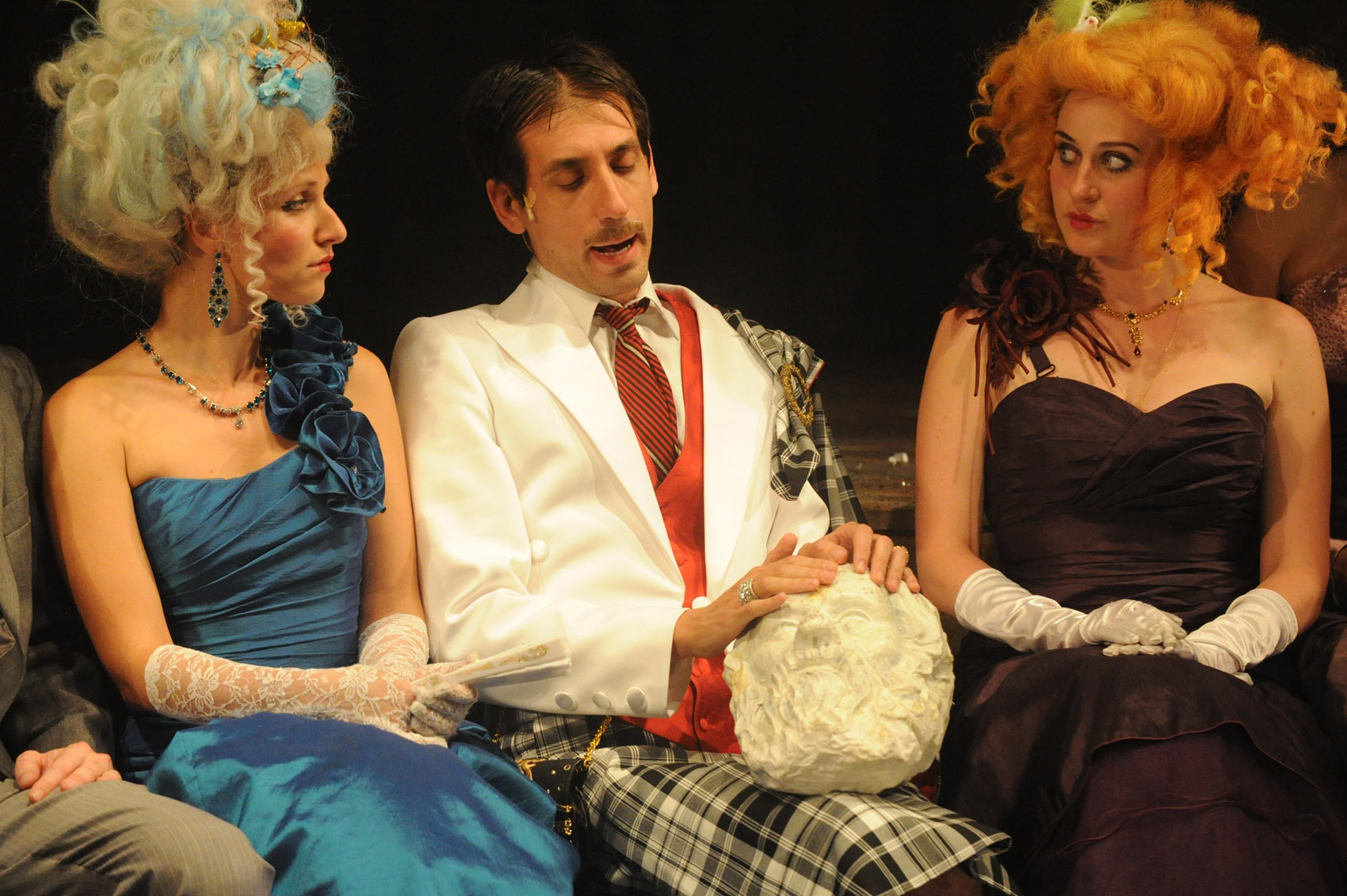 יעל טוקר בהצגה פרימה דונה, תיאטרון גשר